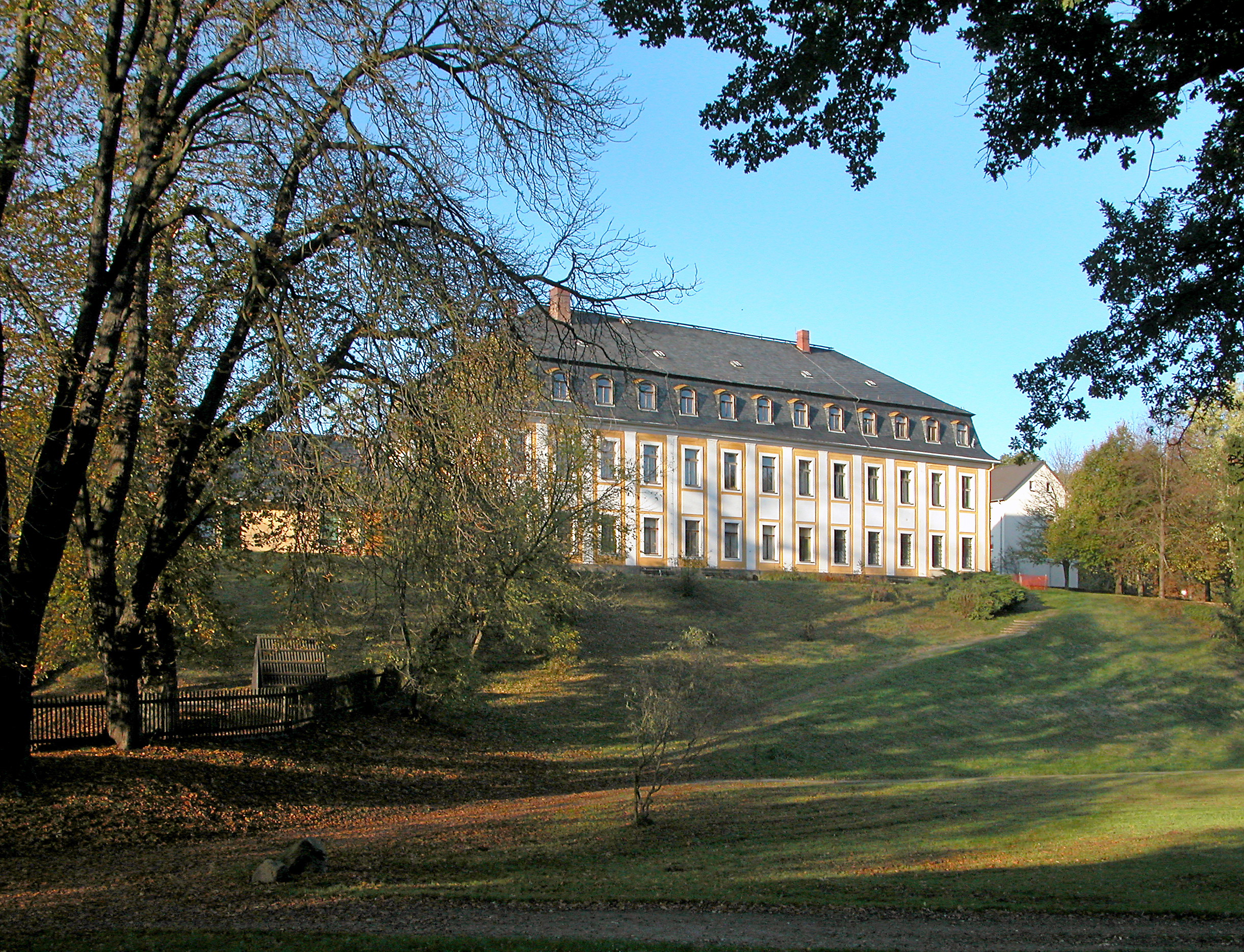 15.10.2007 08539 Leubnitz (Rosenbach), Am Park 1 (GMP: 50.515378,12.022288): Schloß, 1794 unter Heinrich Wilhelm von Kospoth im spätbarock-frühklassizistischen Stil errichtet. In der DDR Schule und Kindergarten. Heute Sitz der Gemeindeverwaltung Rosenbach. Seit 2003 betreibt ein Förderverein hier AusteIlungen und Konzerte. Sicht vom Park aus SW. [DSCN30686.TIF]20071015705DR.JPG(c)Blobelt